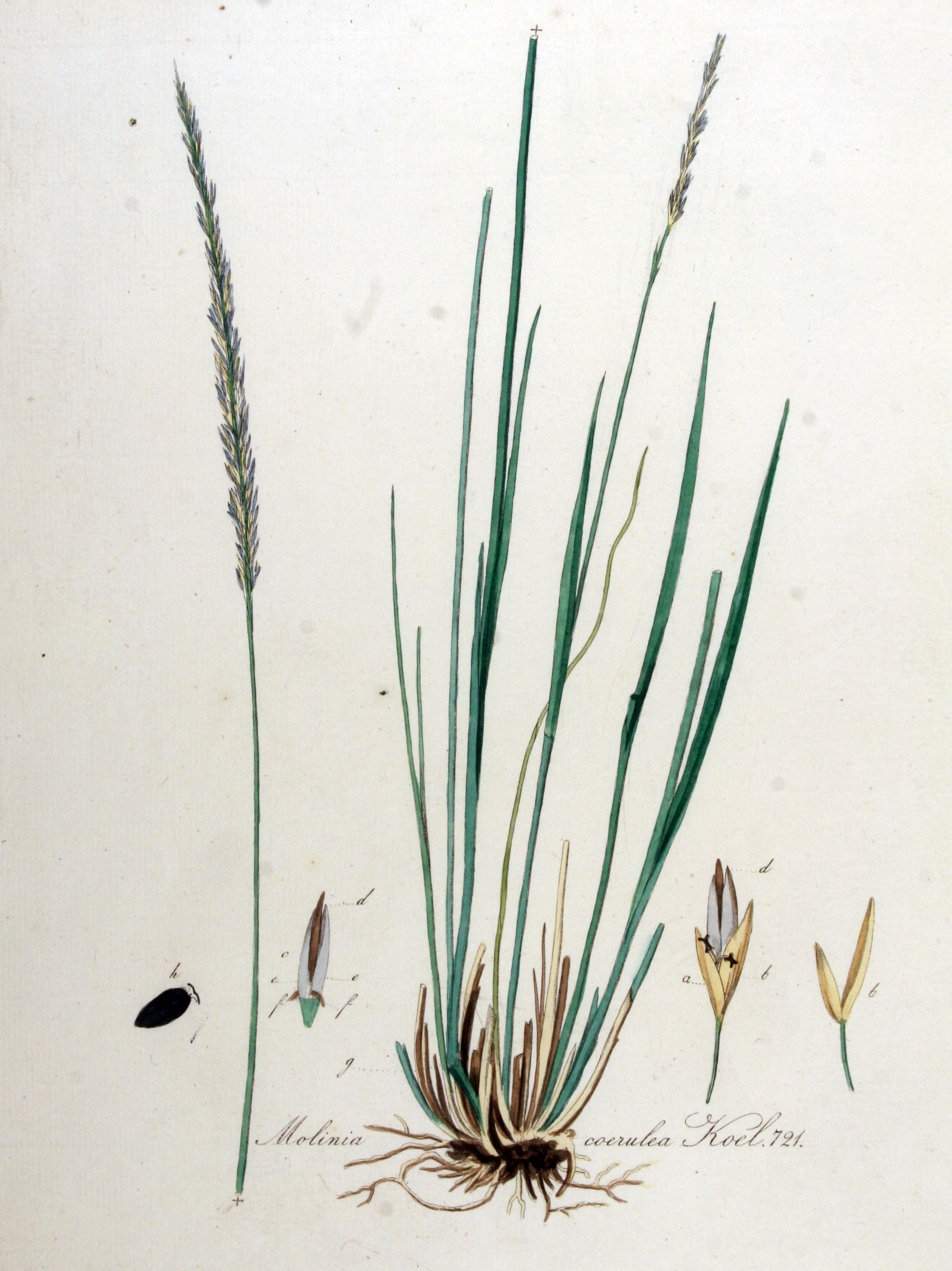 Molinia caerulea (L.) Moench